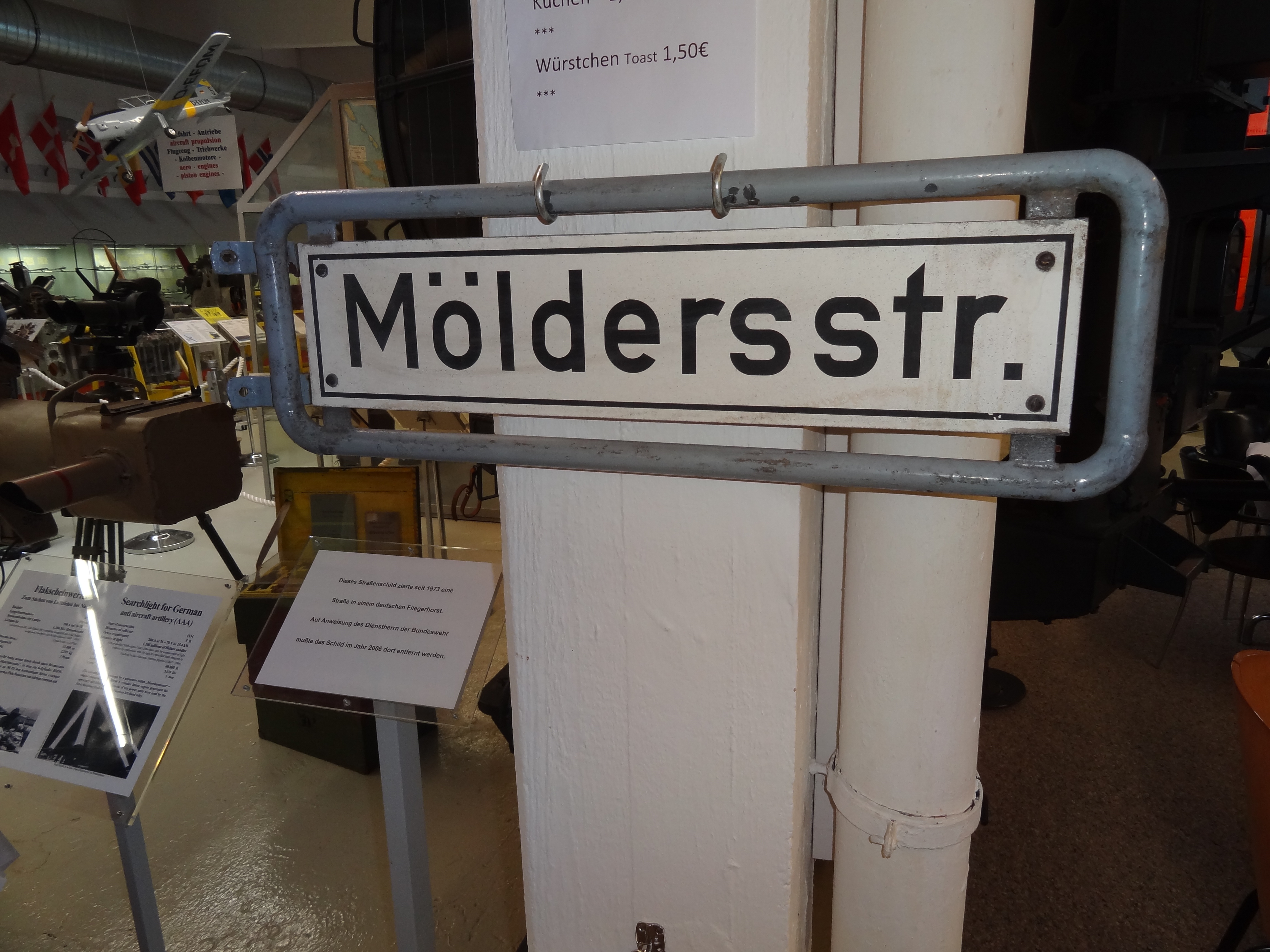 Werner Mölders road sign, Luftfahrt-Museum Laatzen-Hannover